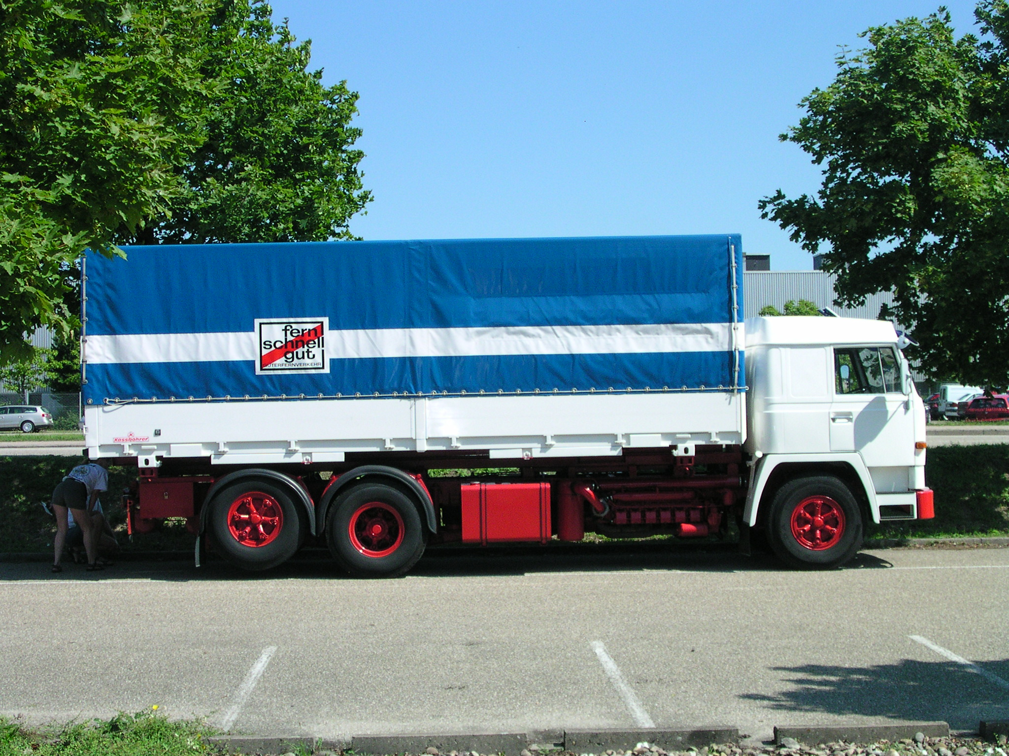 großes Oldtimertreffen im Mercedes-Werk in Wörth am Rhein 2006